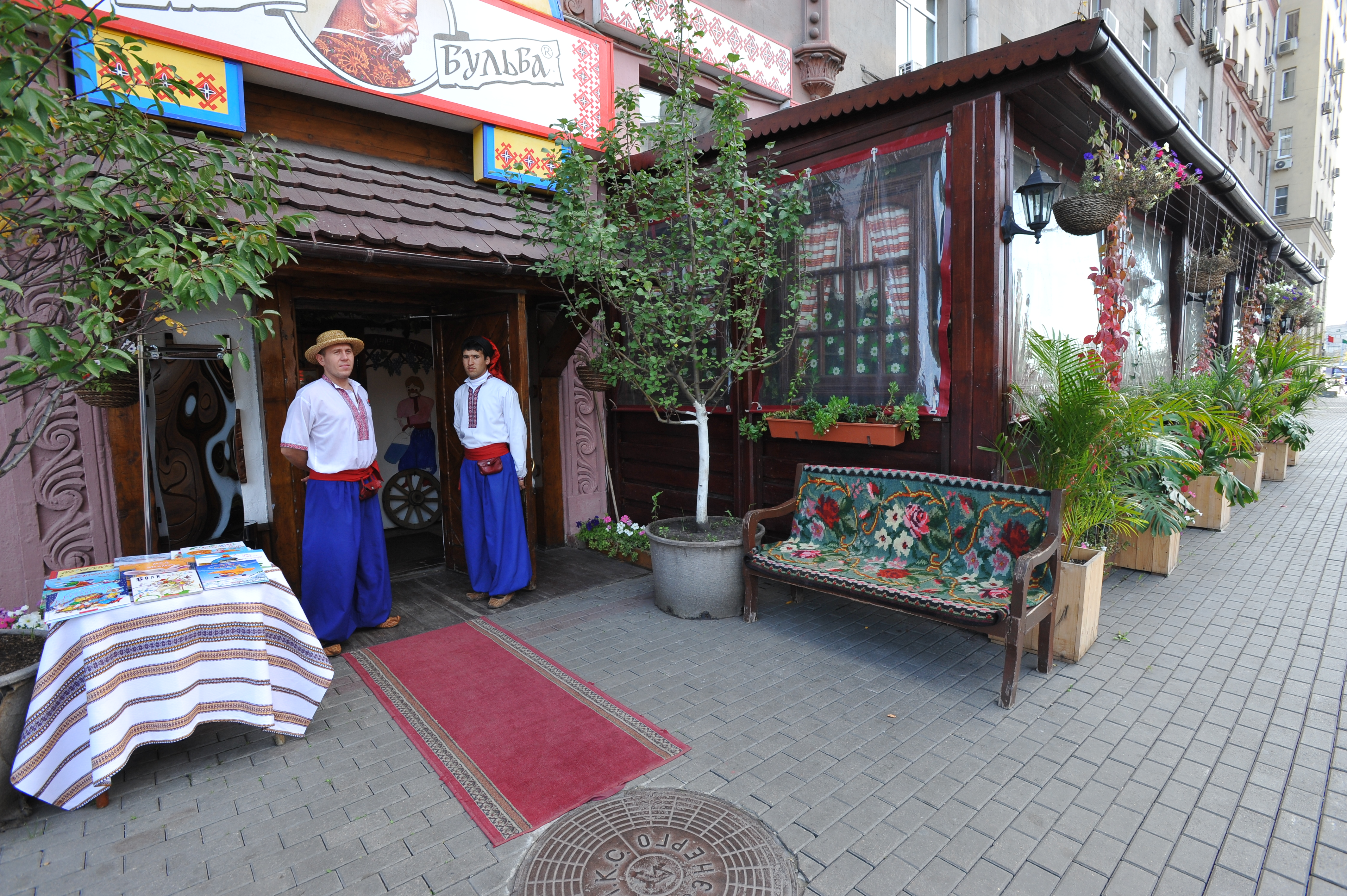 Вход в Корчму Тарас Бульба